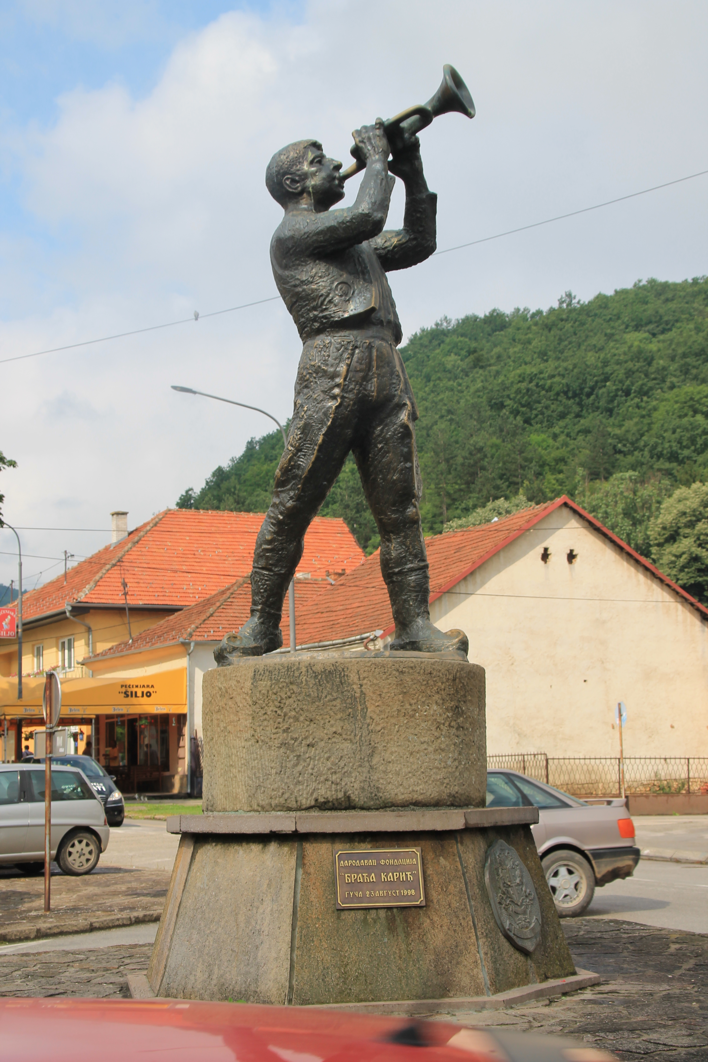 Guča (Srbija)